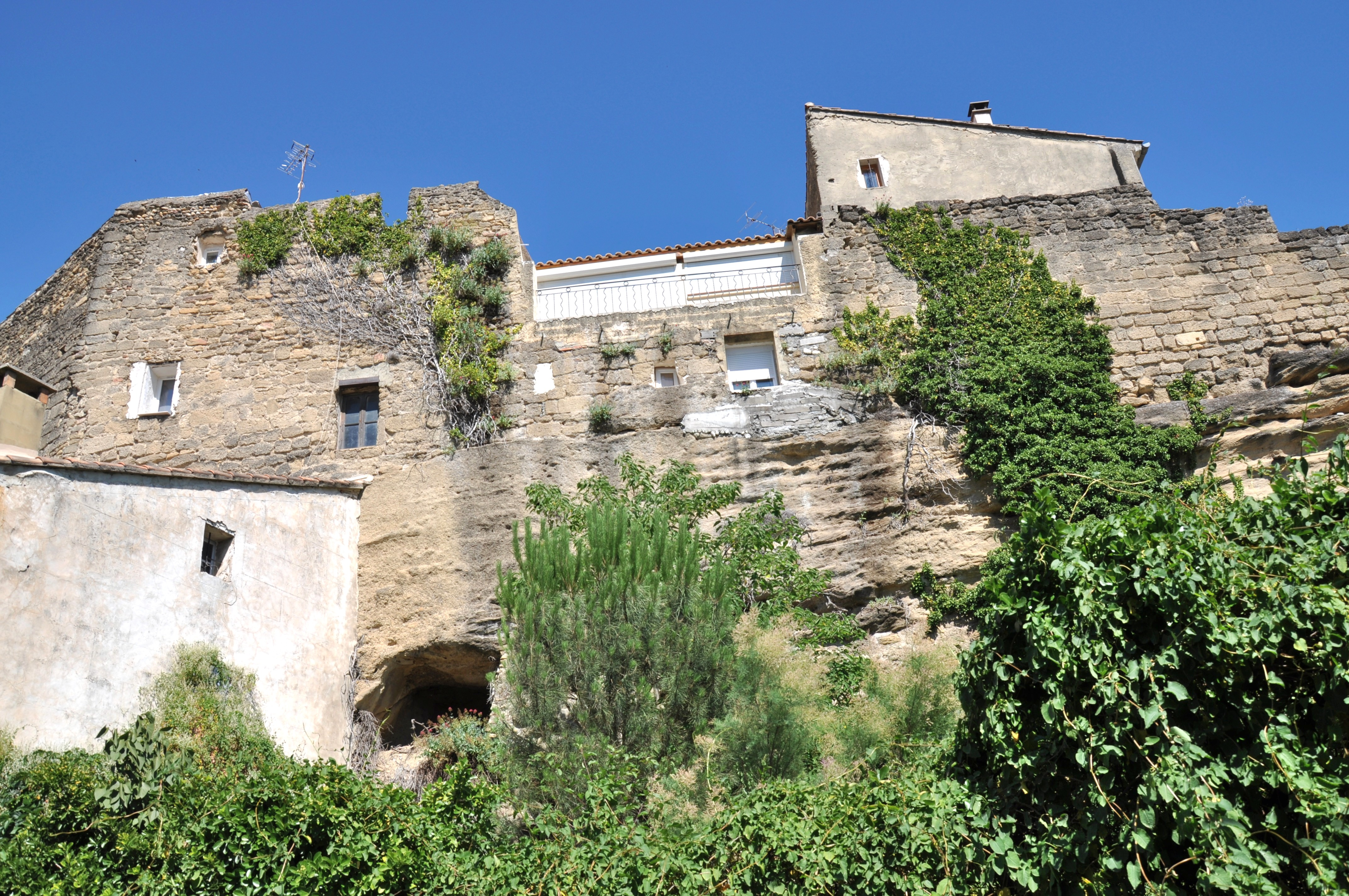 Ilokano: Muraille Entraigues sur la sorgue